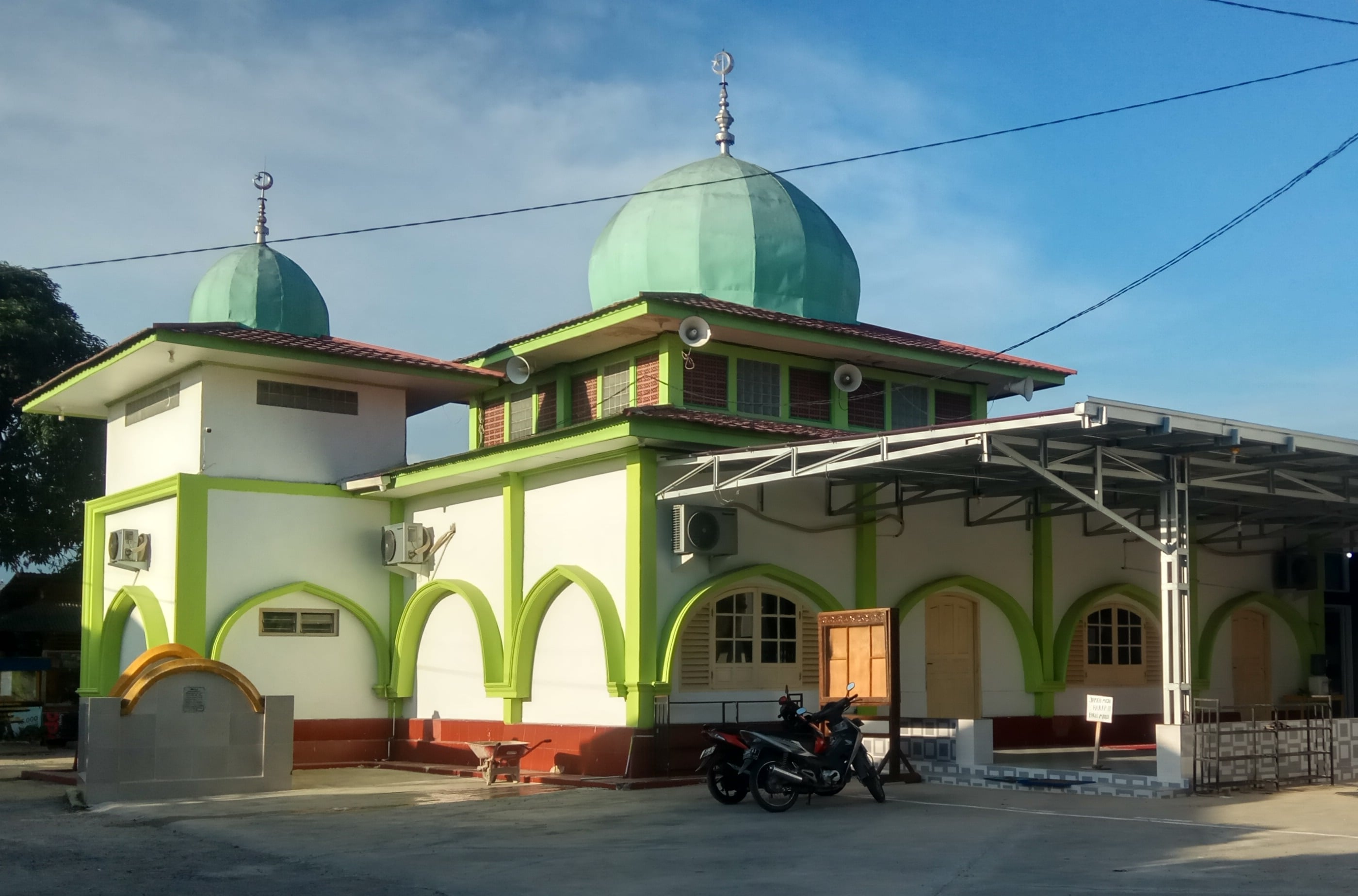 Masjid Istighfar di Kelurahan Ganting Parak Gadang, Kecamatan Padang Timur, Kota Padang, Sumatra Barat, Indonesia.